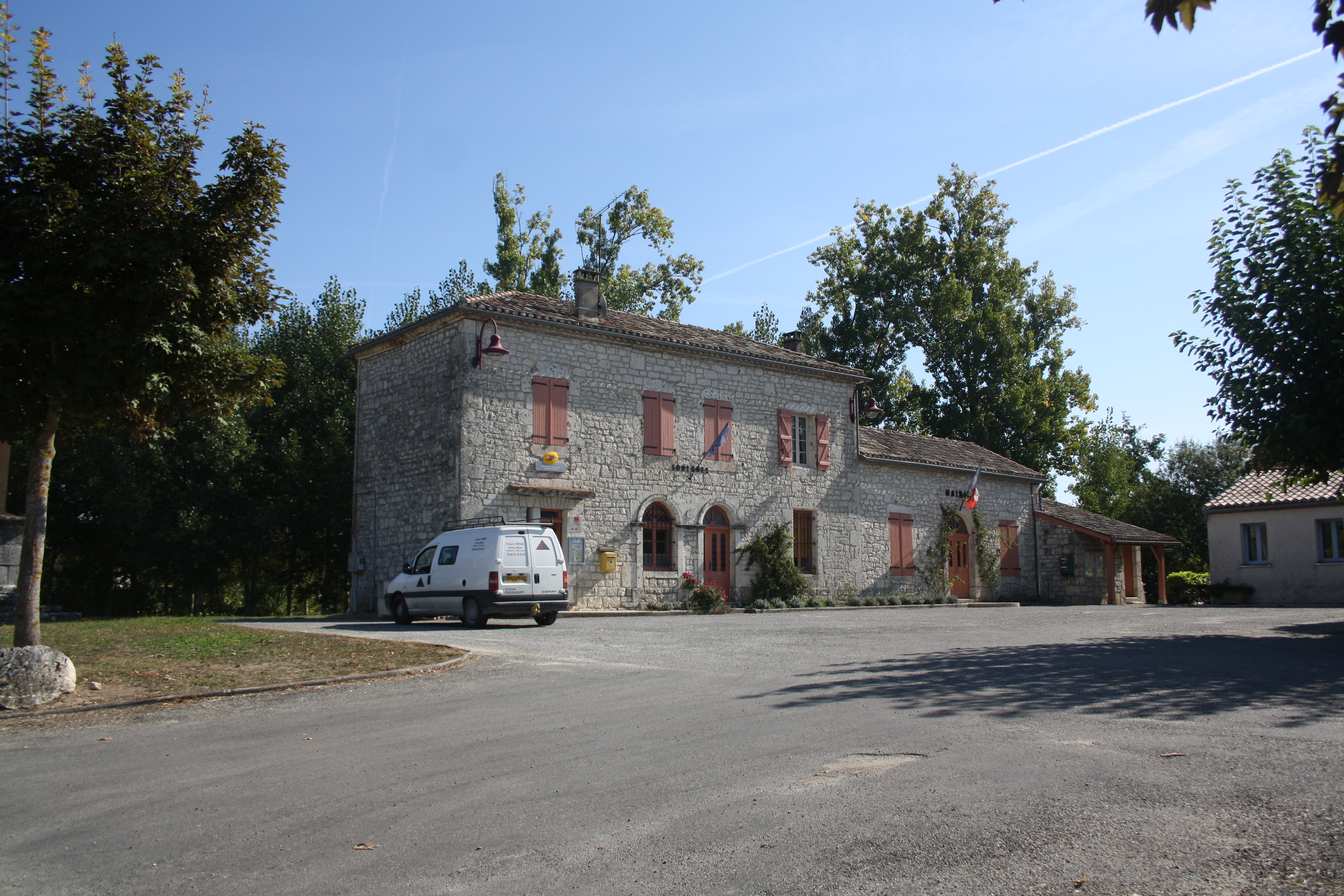 Mairie de Fontanes, Lot (France).